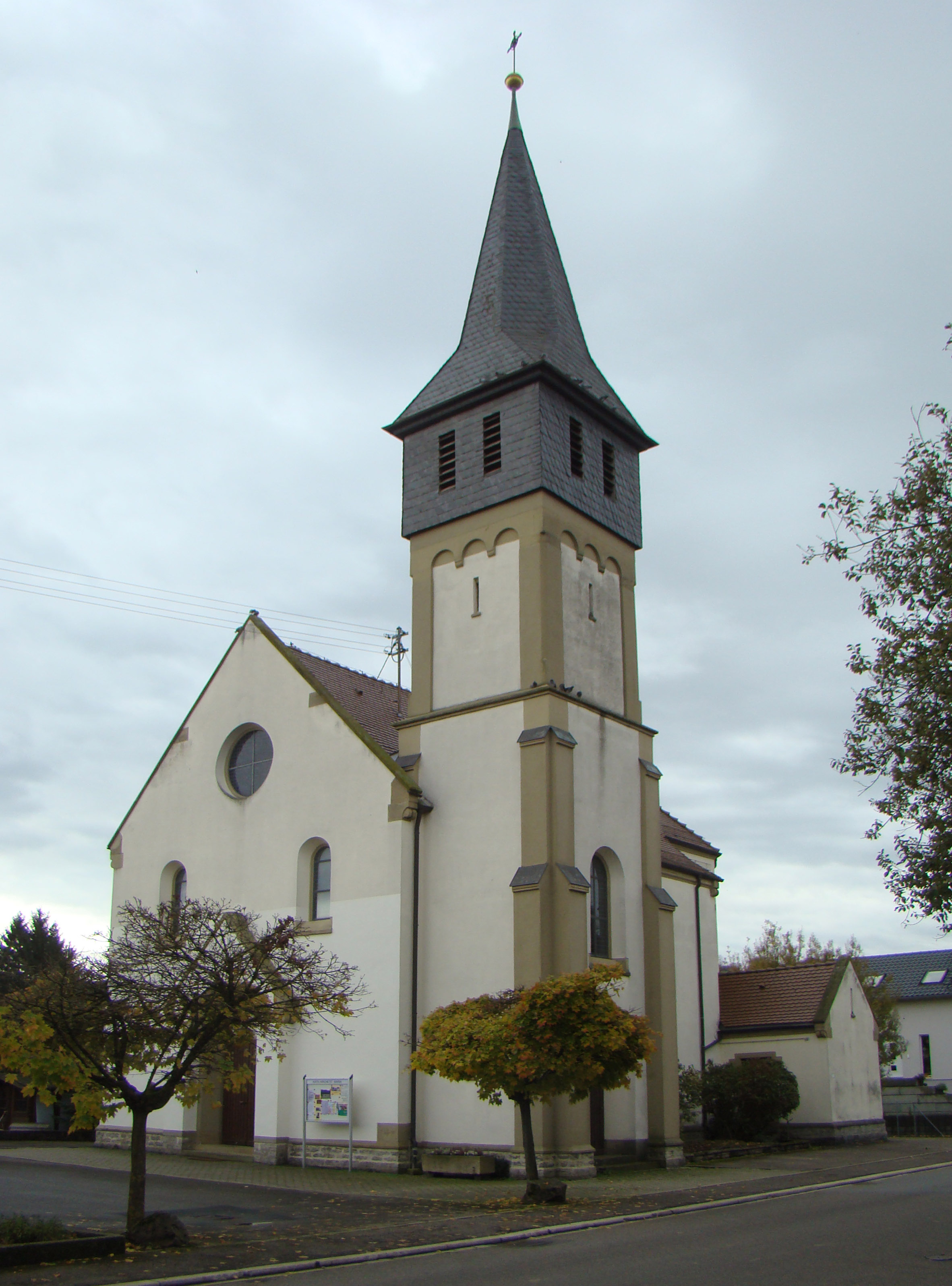 Obrigheim-Asbach, kath. Kirche